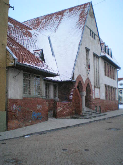 Ľudová_škola_V_Skalici_3